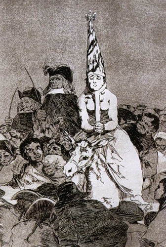 Ф.Гойя._Из_цикла_Los_Caprichos_1797-98.jpg "No hubo remedio", grabado nº 24 de la serie No hubo remedio No hubo remedio